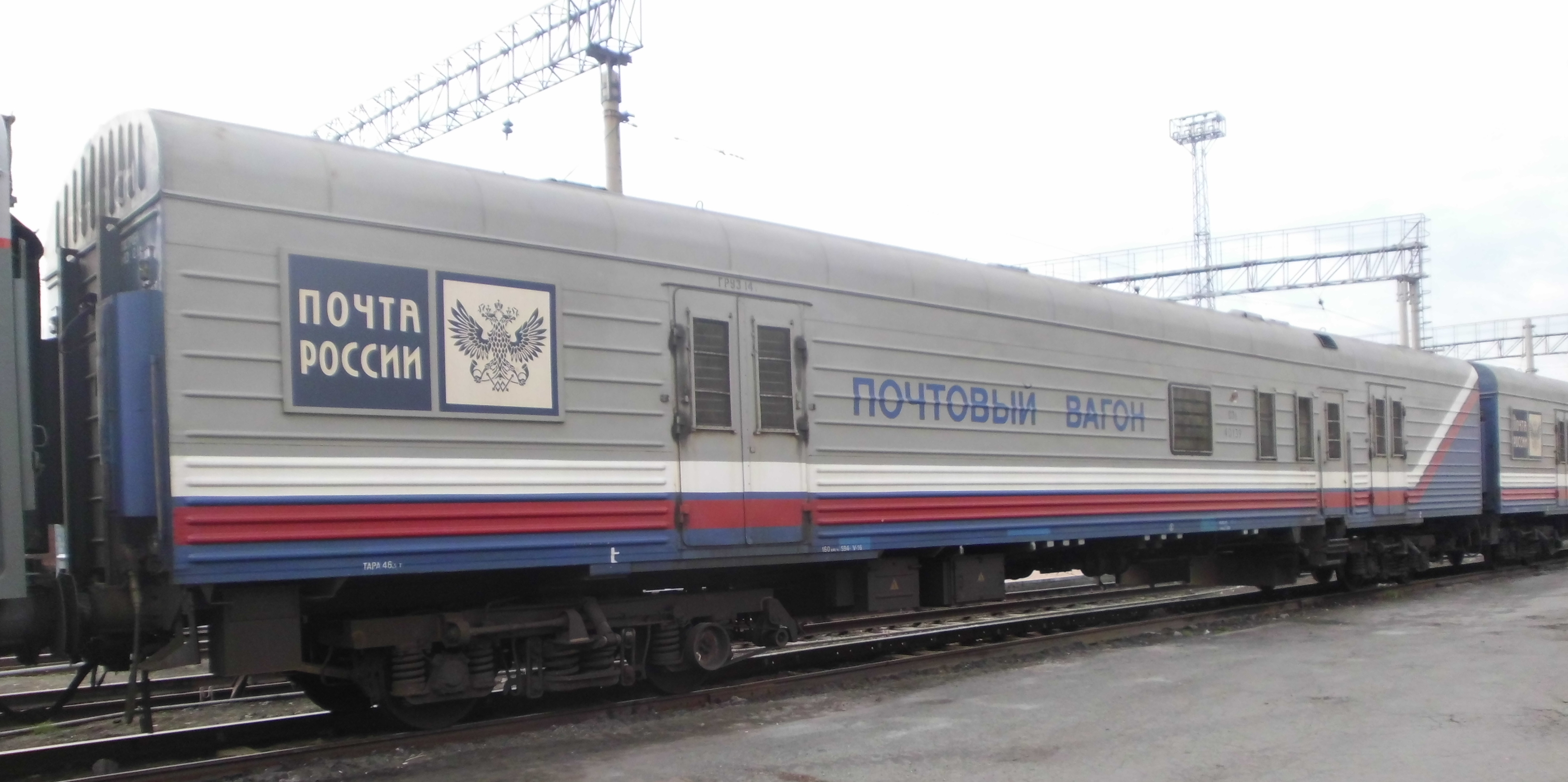 Почтовый вагон ФГУП "Почта России" на базе четырехосного цельнометаллического почтового вагона модели 61-906 ОАО “Торжокский вагоностроительный завод”. Россия, станция Челябинск-Главный, подъездные пути Челябинского Почтамта.